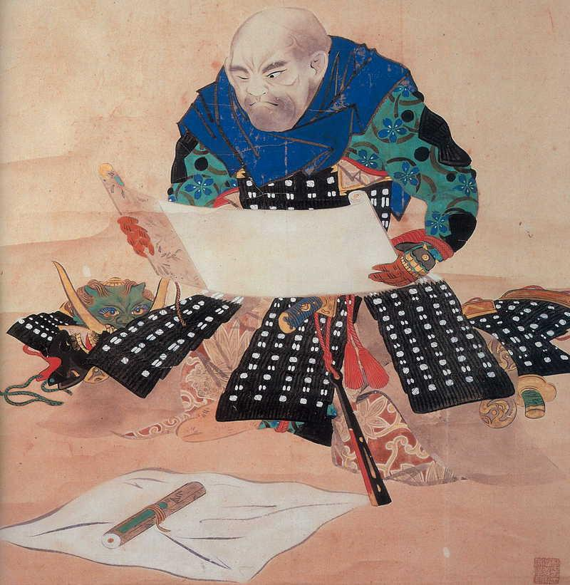 戦国時代の武将・山本勘助の肖像画。恵林寺蔵。